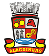 Brasão do município de Alagoinhas, Bahia, Brasil.